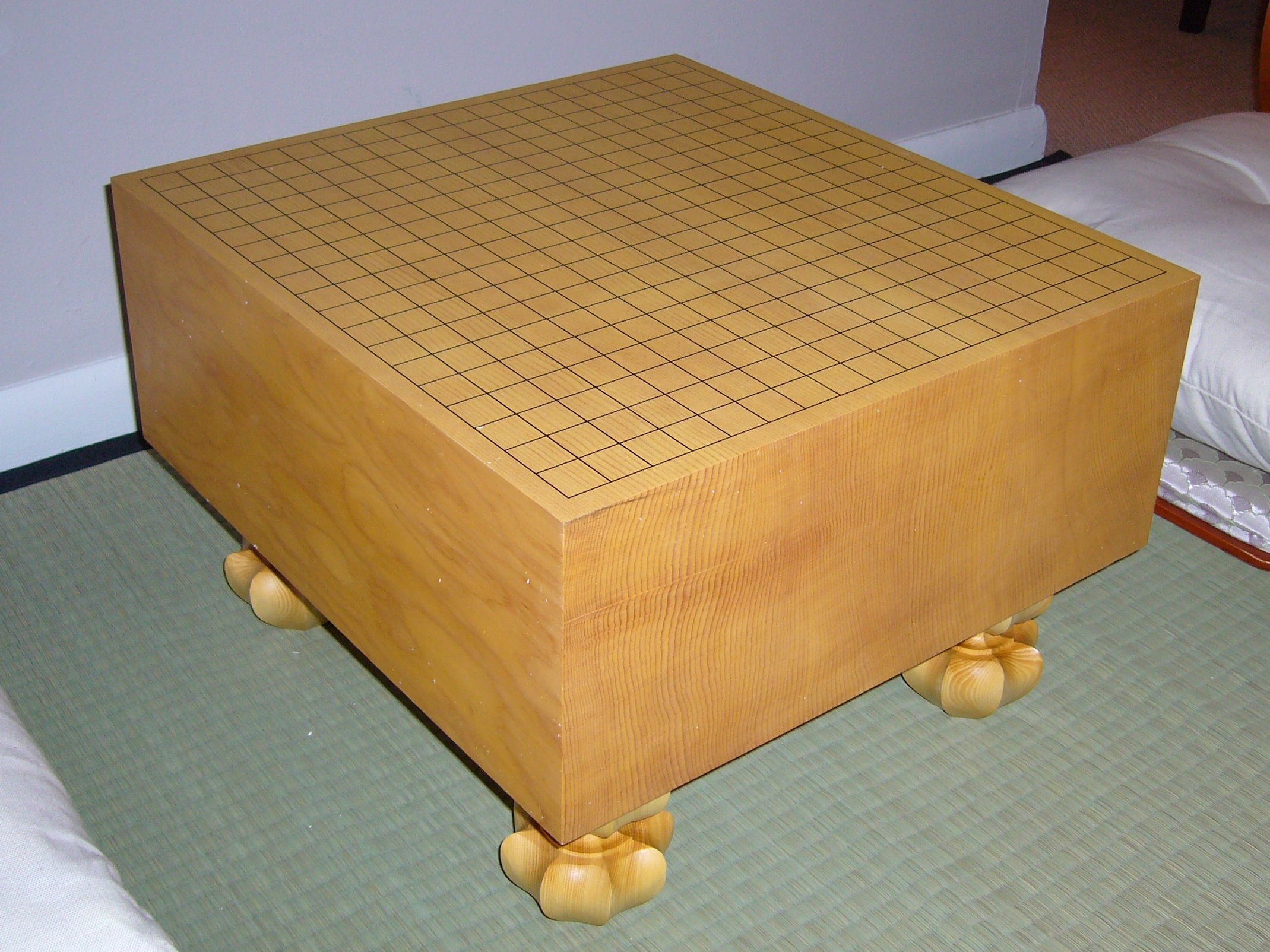 Традиционный японский гобан